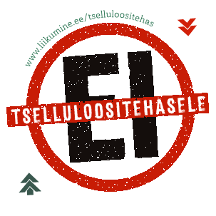 13. mai meeleavalduse teavituseks valmistatud infokleebis